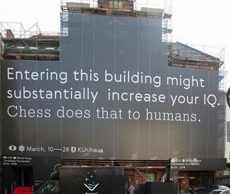 Турнир Претендентов 2018, Место проведения